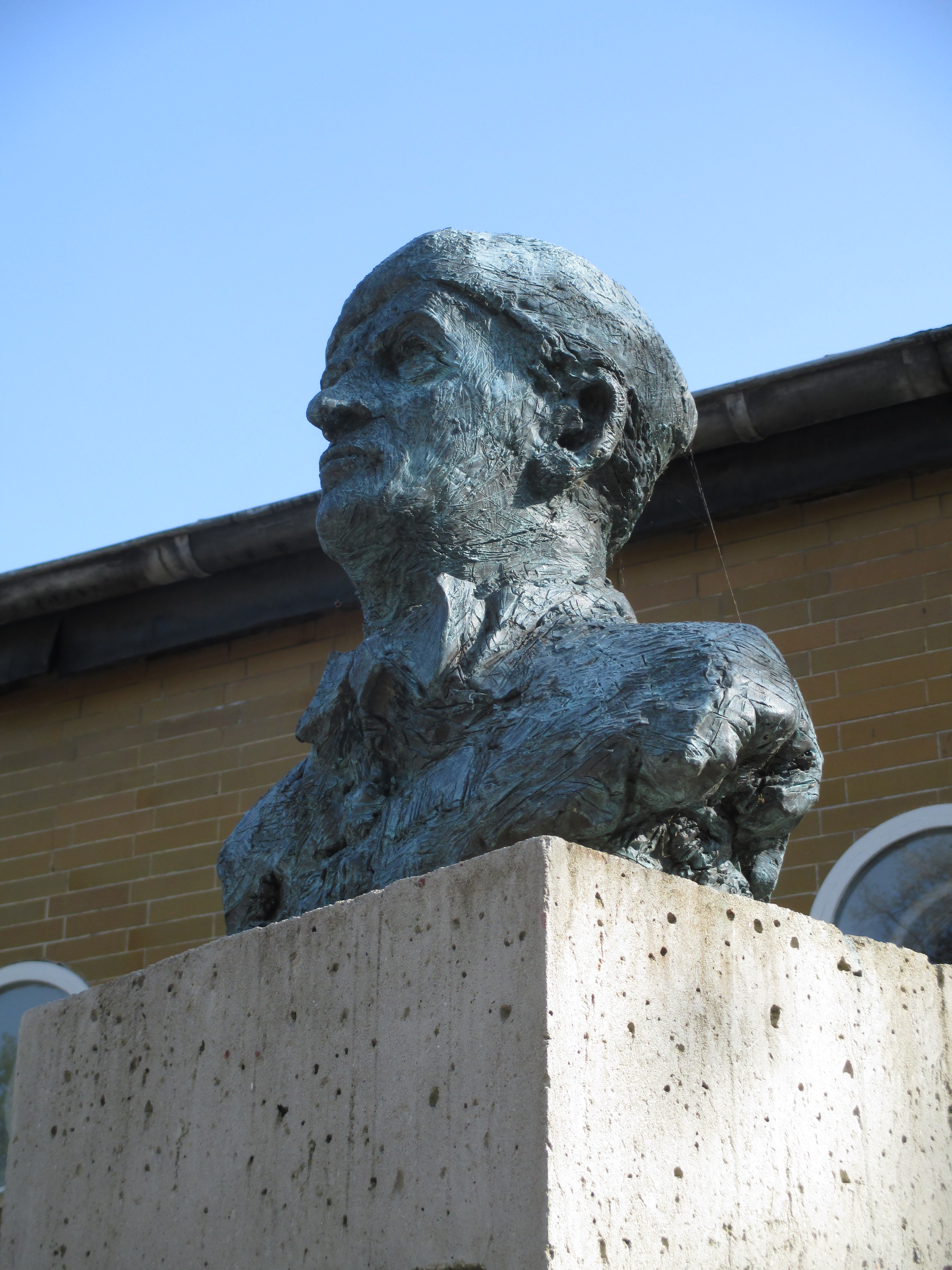 Büste des Architekten Hans Scharoun von Andrzej Irzykowski Westeingang der Geschwister-Scholl-Schule.